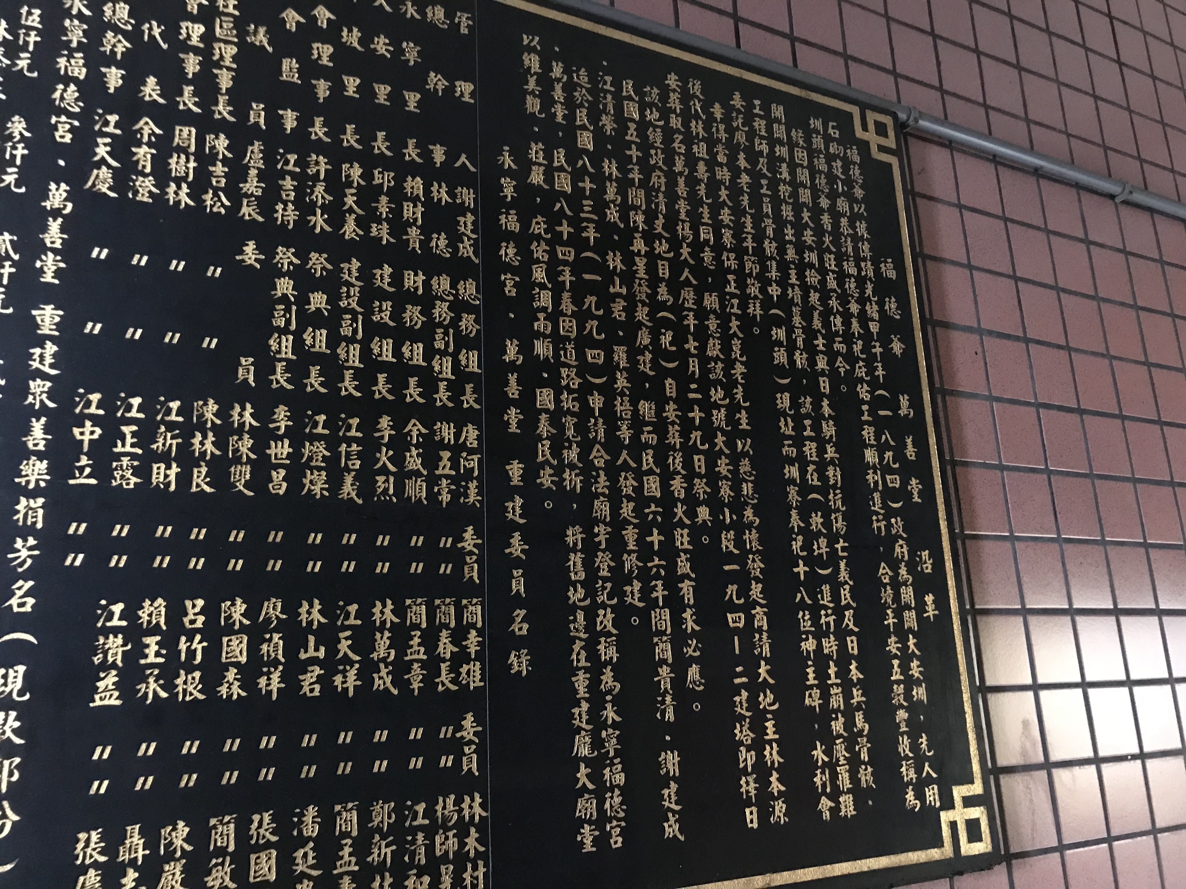 中文（台灣）: 永寧福德宮沿革